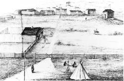 Dibujo de Fort Livingstone, Territorios del Noreste, cerca de 1877